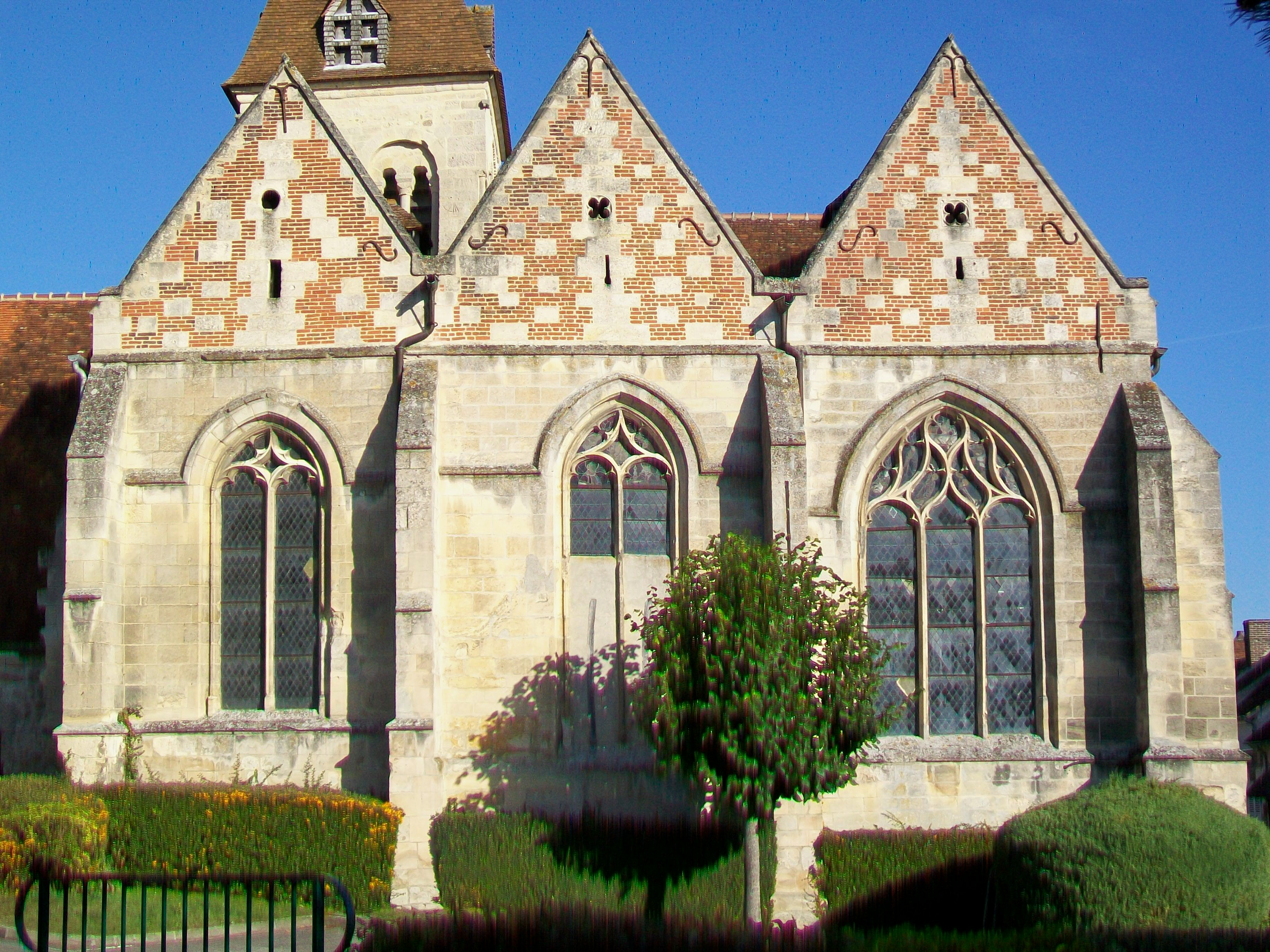 Le transept et le chœur, façade sud-est.